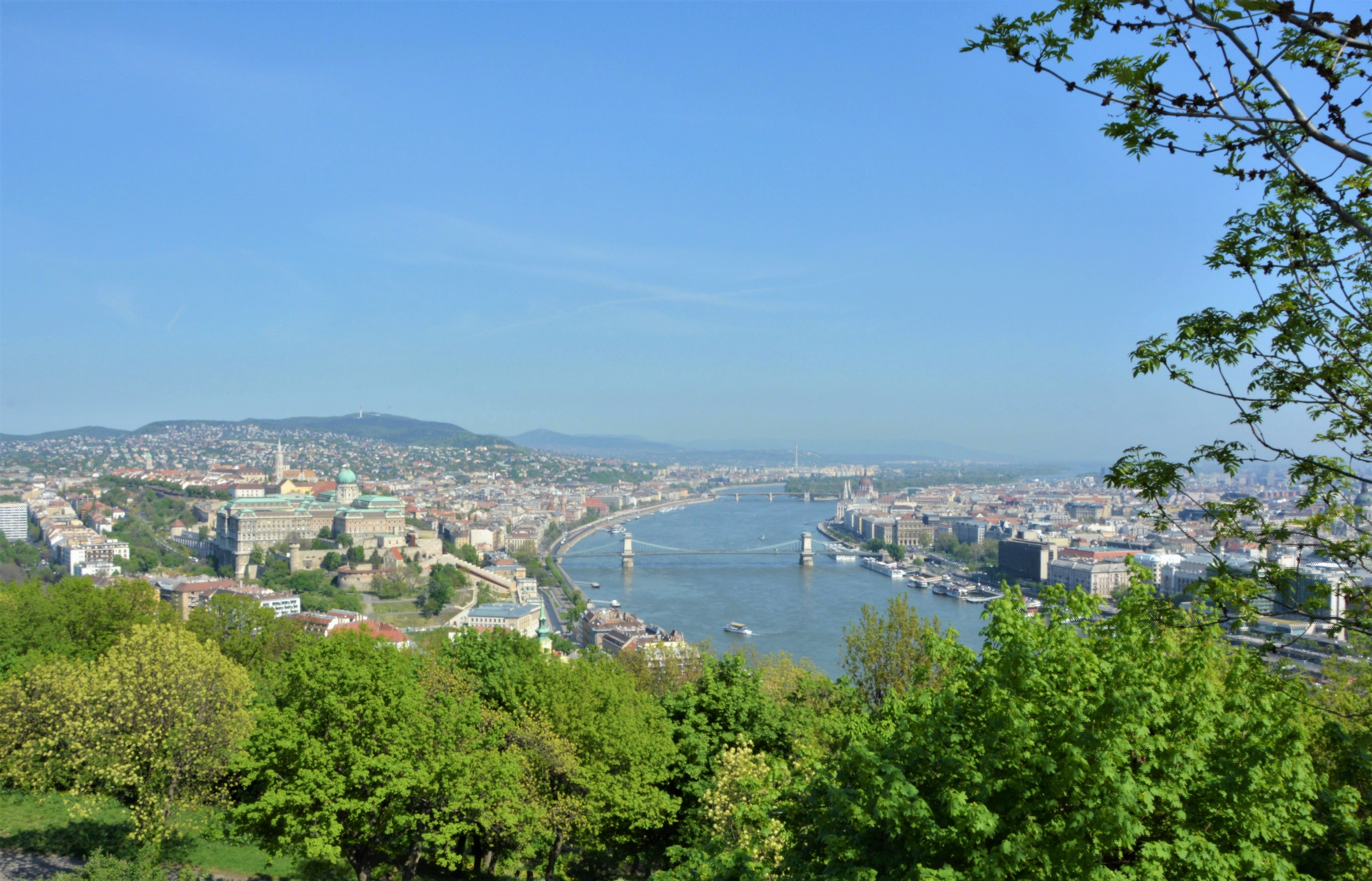 Панорамний вид на Дунай з гори Геллерт